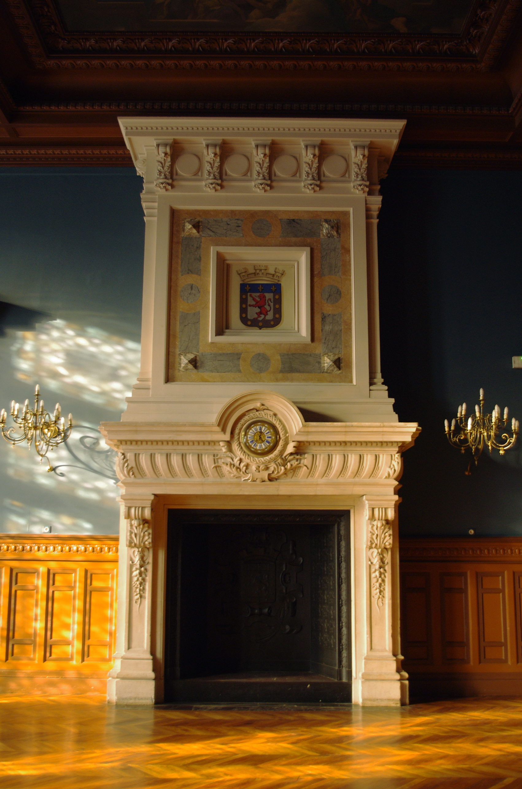 Cheminée de l'ancienne salle du Conseil, dite aujourd'hui "Salle du blason", hôtel de ville de Poitiers, XIXe siècle